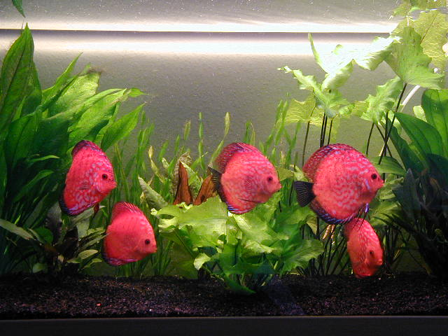 Wing自己家里养的鱼